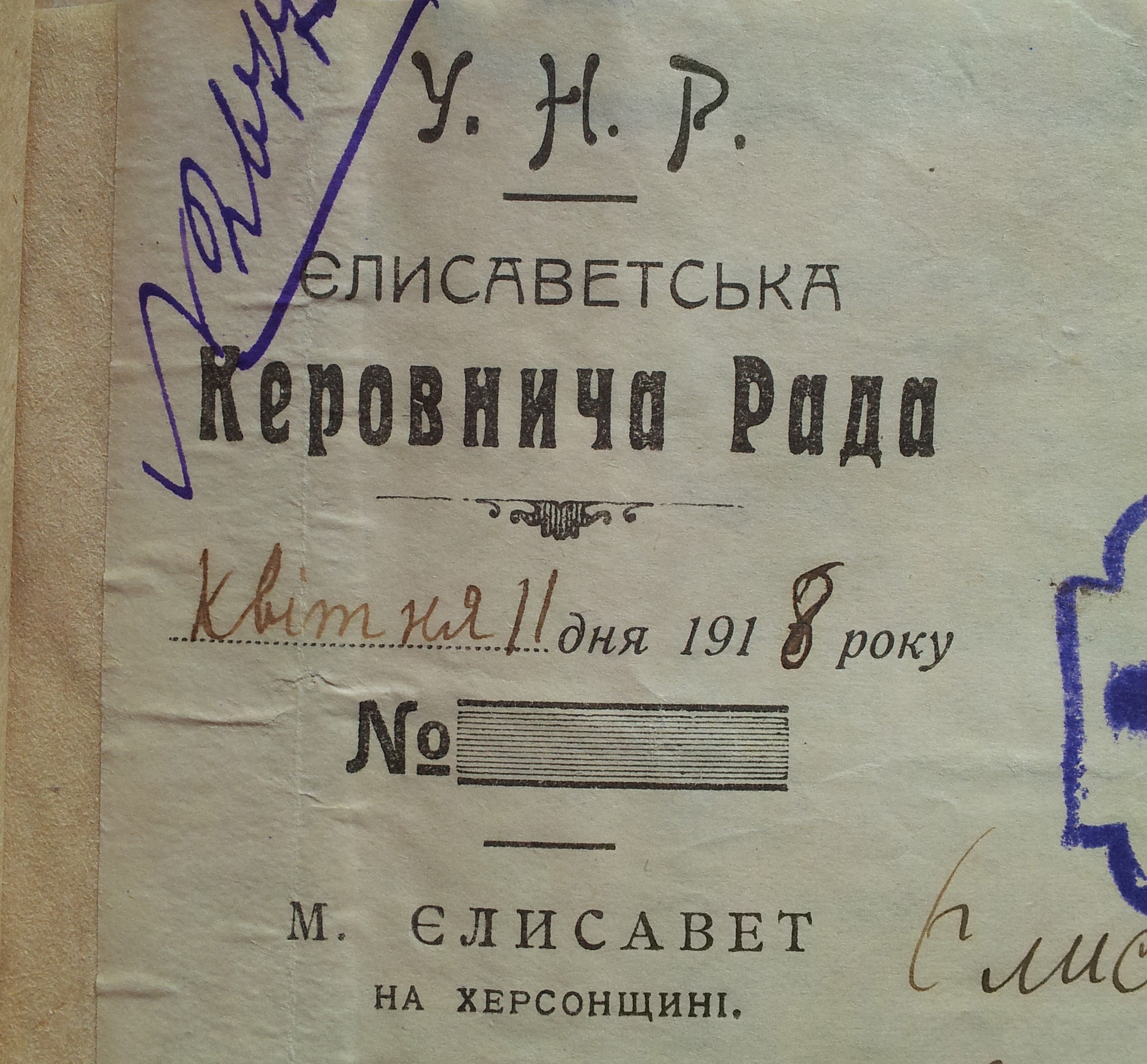 Фрагмент фірмового бланку Єлисаветської Керовничої Ради м. Єлисавета 11.04.1918